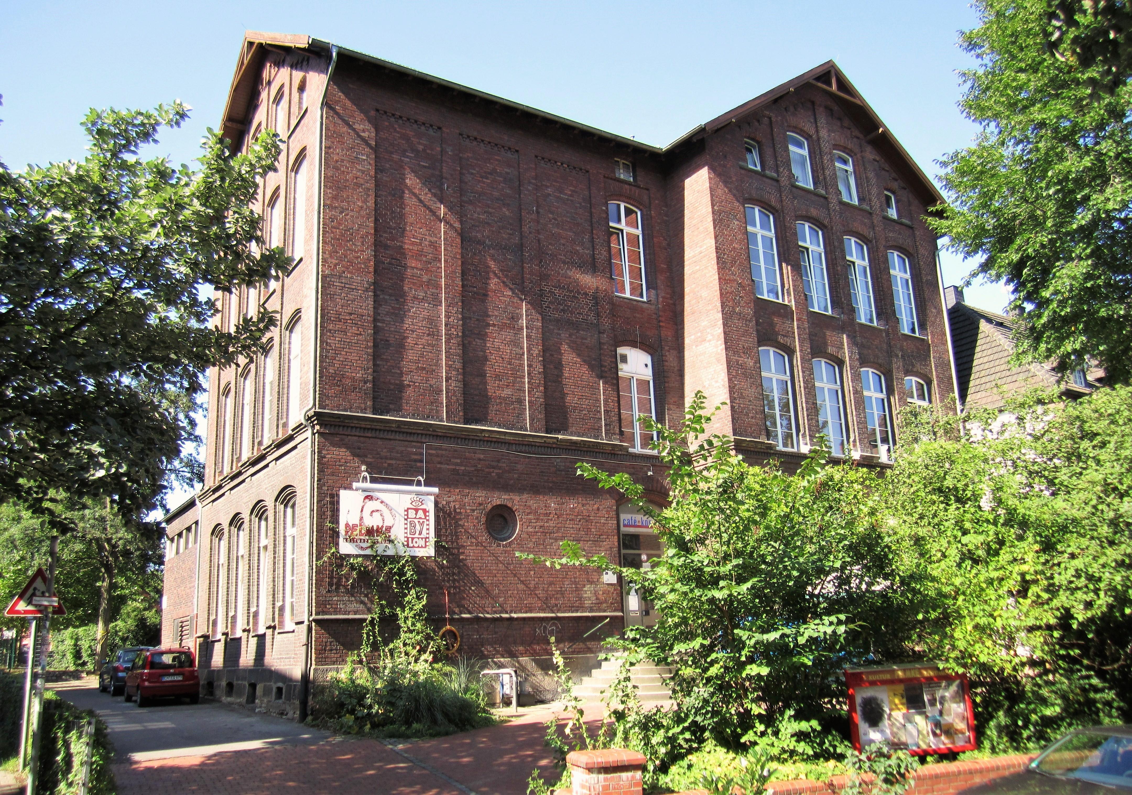 Denkmalgeschützte ehemalige Schule in Hagen-Wehringhausen, Pelmkestraße 14. Erbaut 1890 als Volksschule, 1979 geschlossen und anschließend zum Kulturzentrum Pelmke umgebaut. Hier befindet sich auch das „Babylon“, Hagens einziges Programmkino. This is a photograph of an architectural monument.